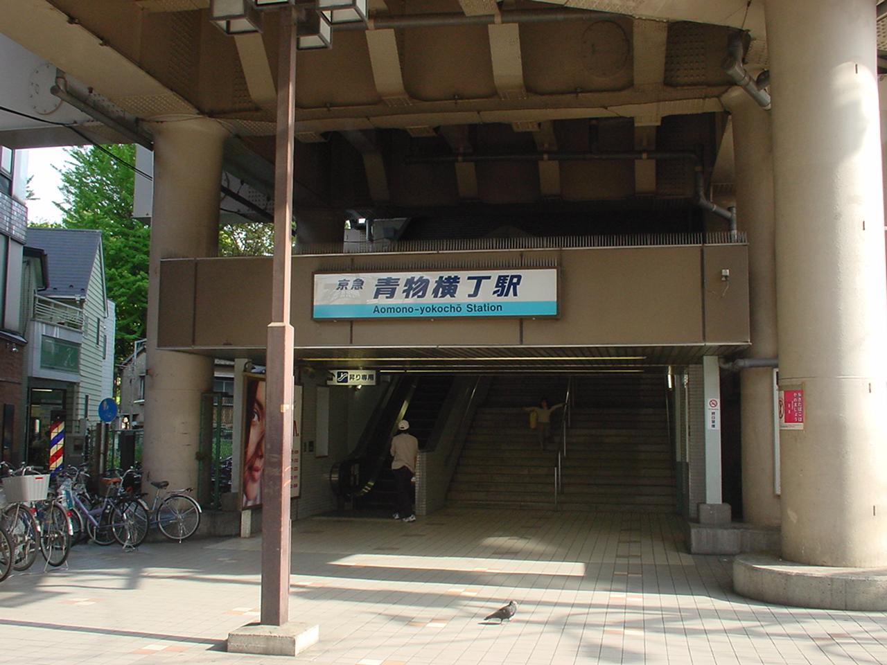 Exit of Aomono-yokochō Station, Keikyū Main Line, Shinagawa-ku, Tokyo, Japan